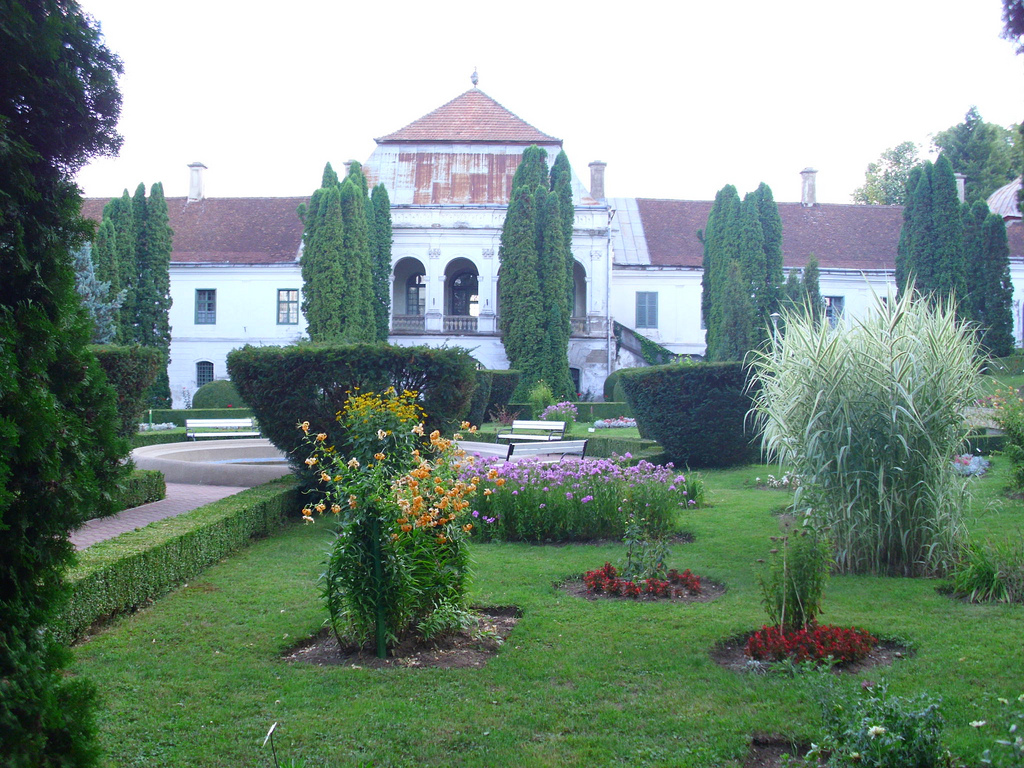 Castelul Wesselenyi - Jibou